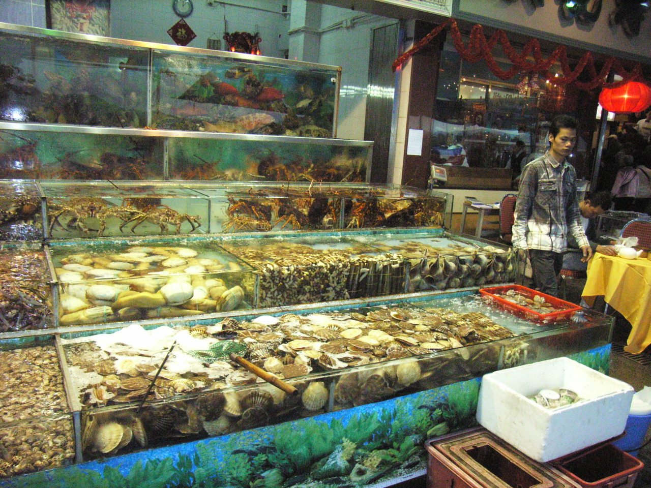 西貢市 西貢碼頭] (Sai Kung) 本身是一個漁村，漁民經常在此聚集，因而逐漸發展成一個著名的zh:海鮮勝地。今日西貢碼頭沿街都是這些擺賣海鮮的攤檔，並且有一些海鮮菜館。 (Photo by me.)